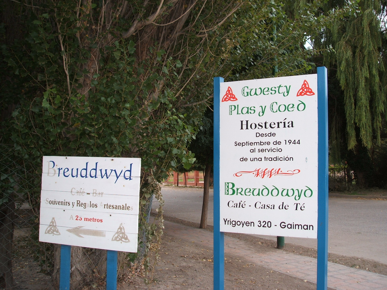 Carteles anunciantes de casas de te en Gaiman, Argentina.